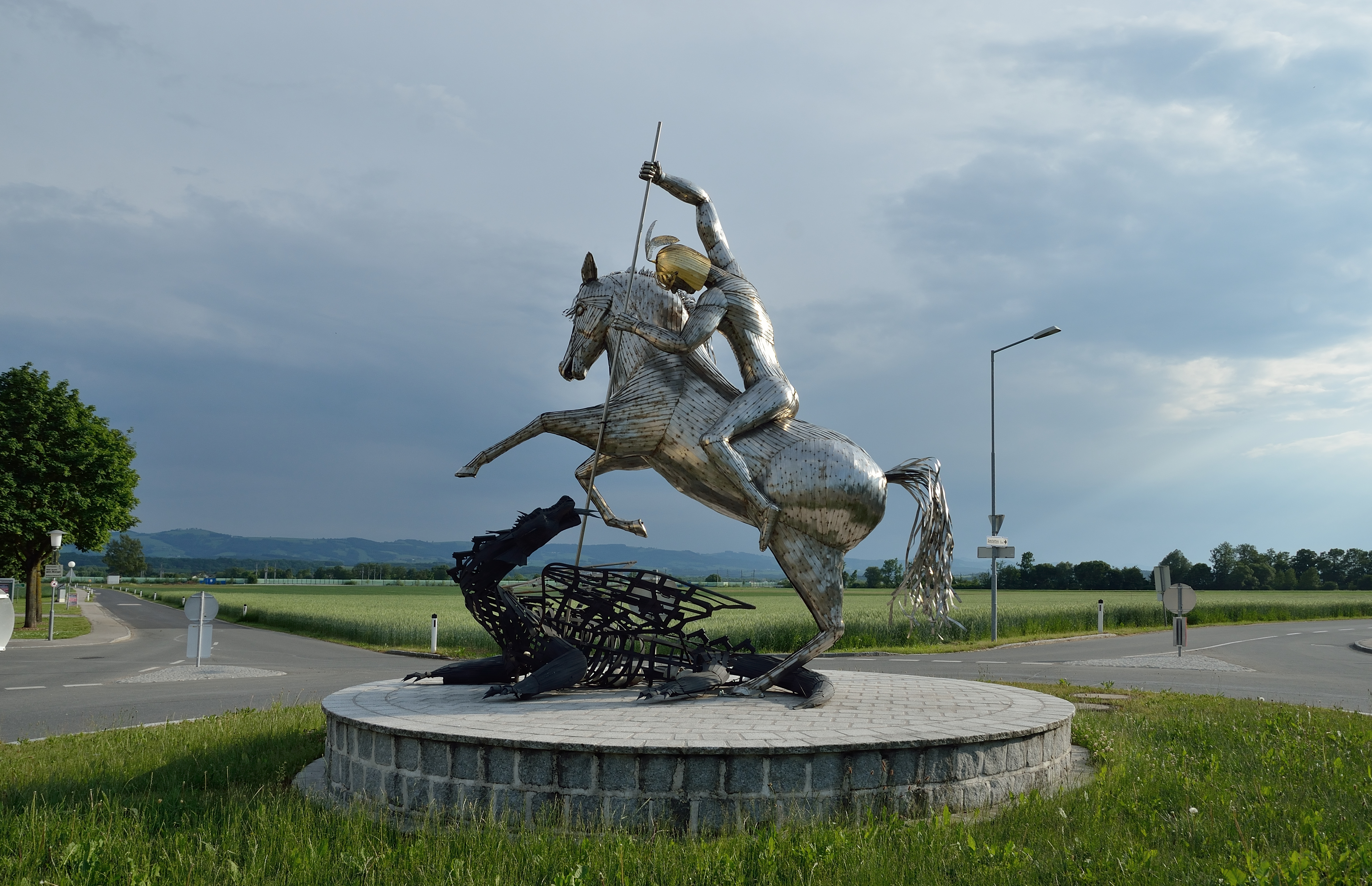 Im Kreisverkehr westlich des Hauptortes St. Georgen am Ybbsfelde steht seit 2014 eine Skulptur von Odin Mohammed Rosenzweig, die den Ortspatron, den hl. Georg, den Drachentöter darstellt. Der Drache soll durch den Einbau von Pistolen und automatischen Gewehren das Böse der Gegenwart verkörpern, im skelettierten Rumpf des Drachens findens sich noch Überreste der verspeisten Jungfrauen.